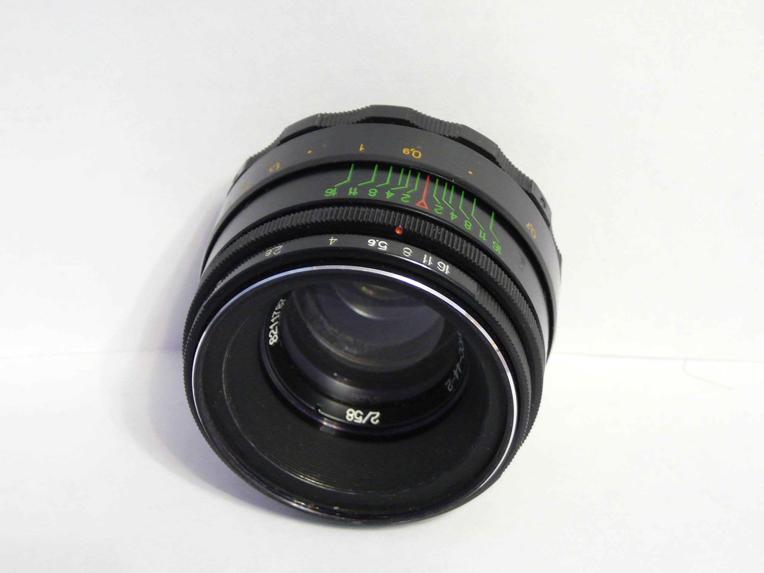 Объектив Гелиос-44-2 2/58 М42х1